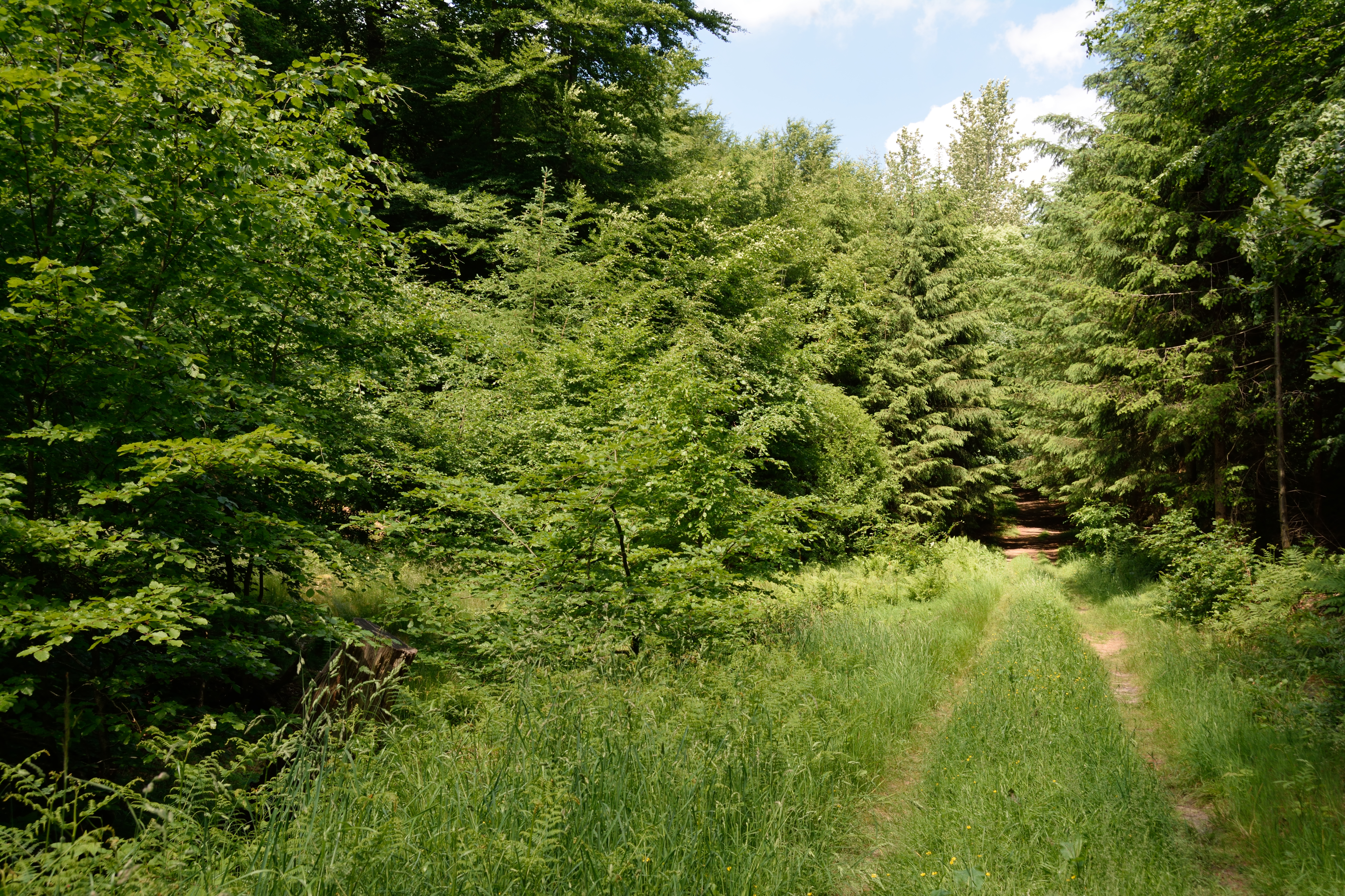 Der Kreis Steinburg hat mehrere Flächen unter dem gemeinsamen Namen "Landschaftsbestandteile und Landschaftsteile im Bereich mehrerer Gemeinden" zusammengefasst. Dieses Foto wurde in der Waldfläche „Gehege Überstör und Katzenkuhle“ einschließlich Baumbestand südlich des Breitenburger Weges in Itzehoe aufgenommen, es ist das Teilstück Nr. 8.